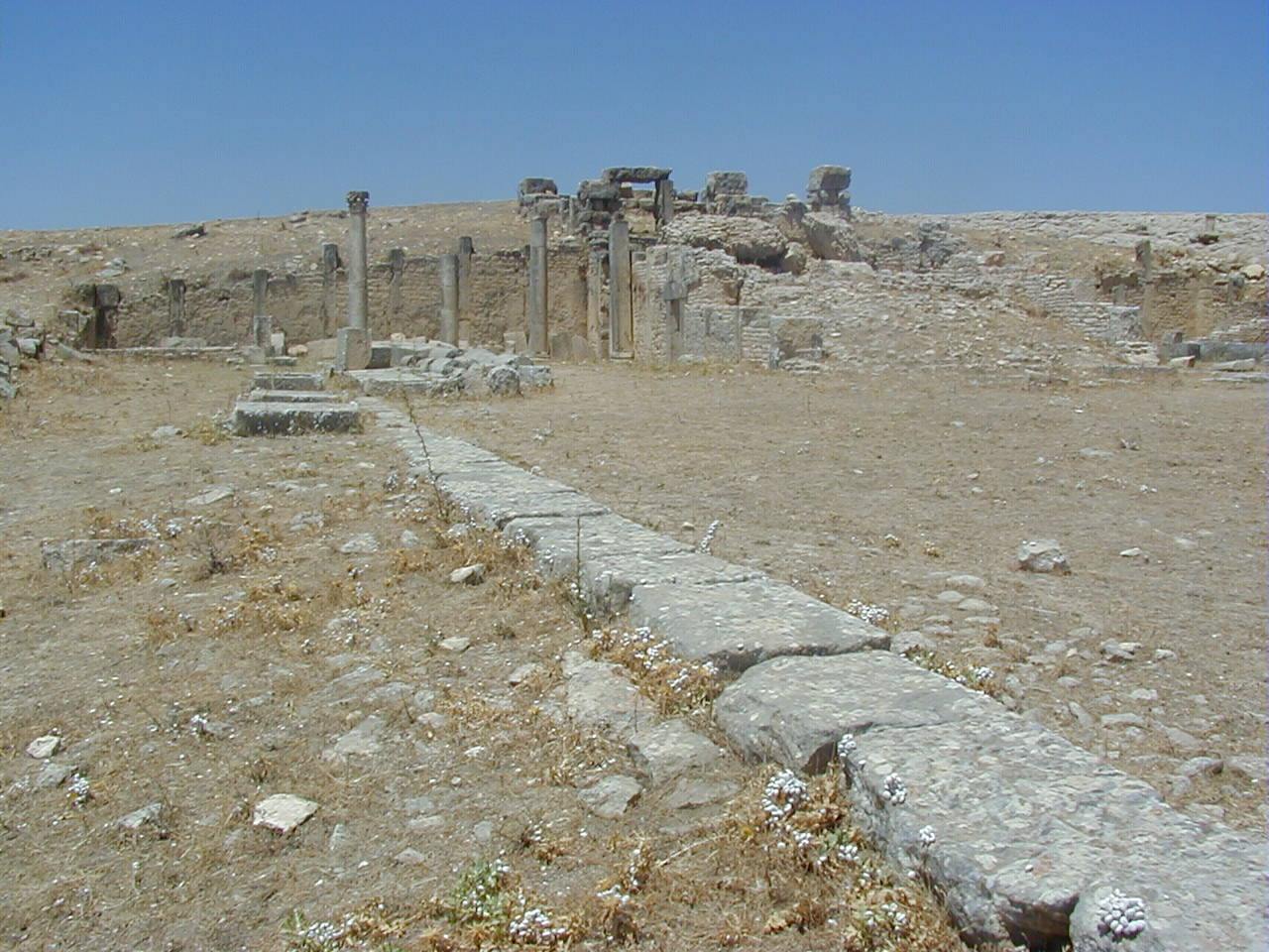 Temple de Minerve II, vu de l'est